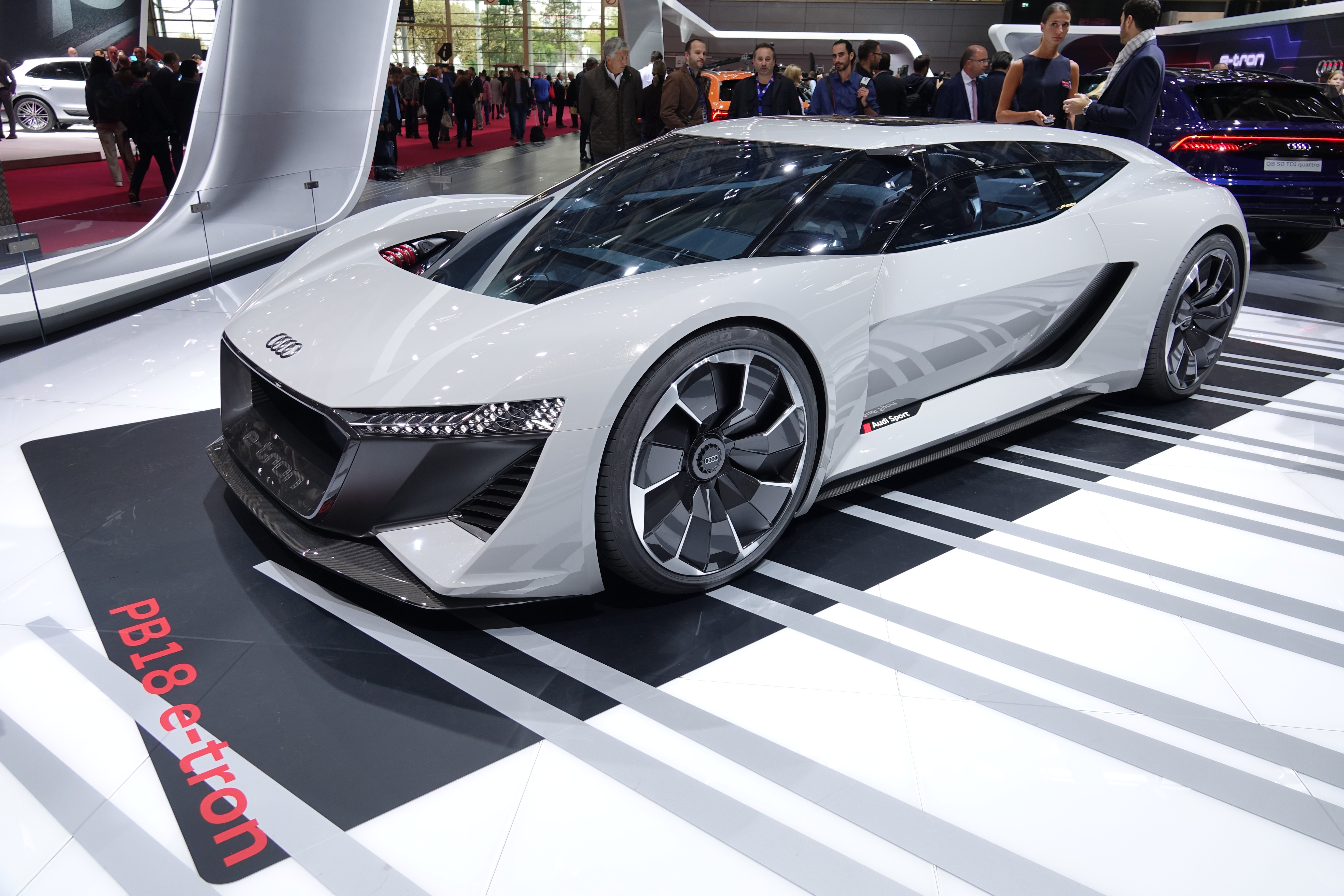 Audi PB18 e-tron au Mondial Paris 2018